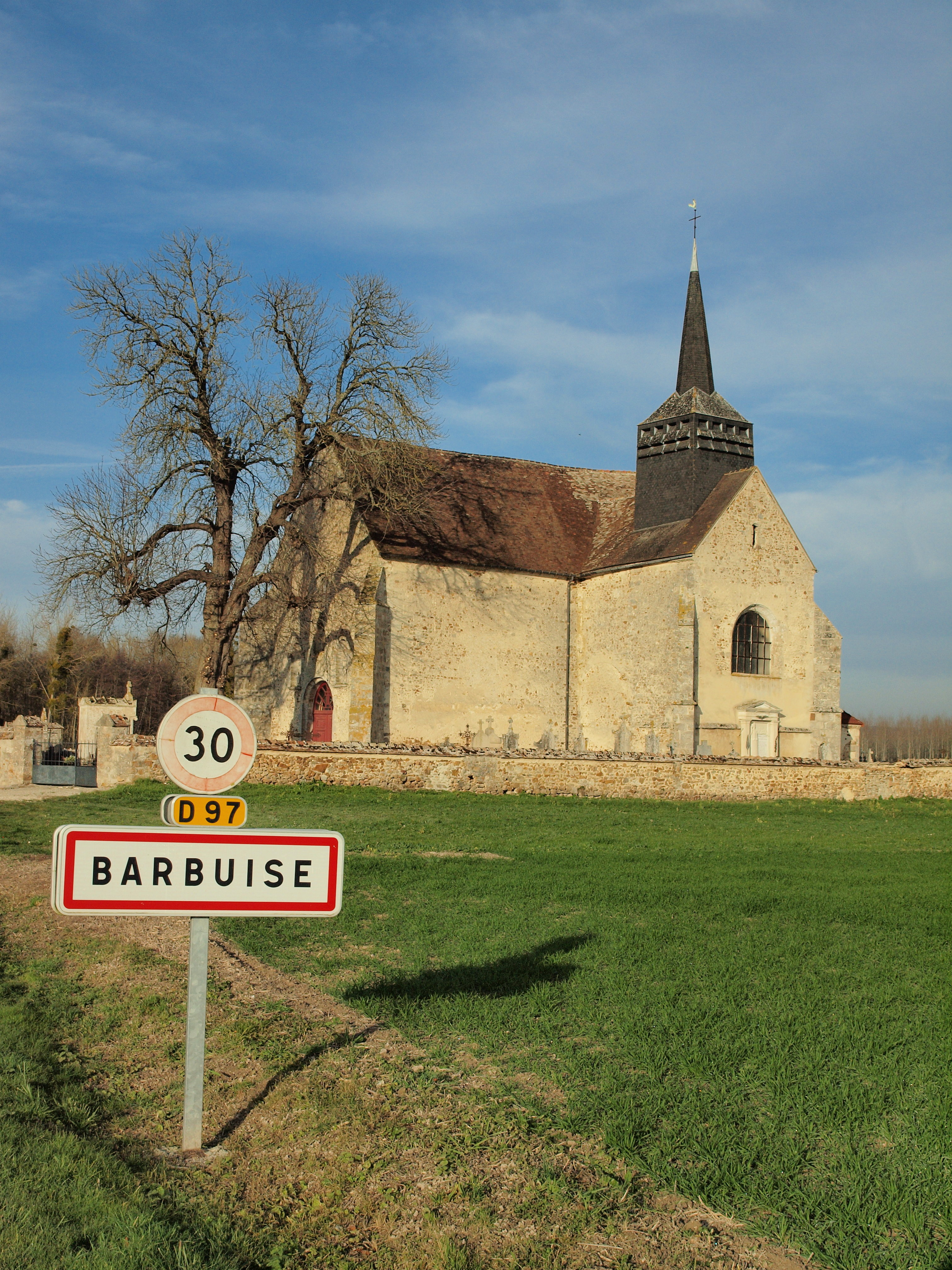 Commune de Barbuise (Aube, France)